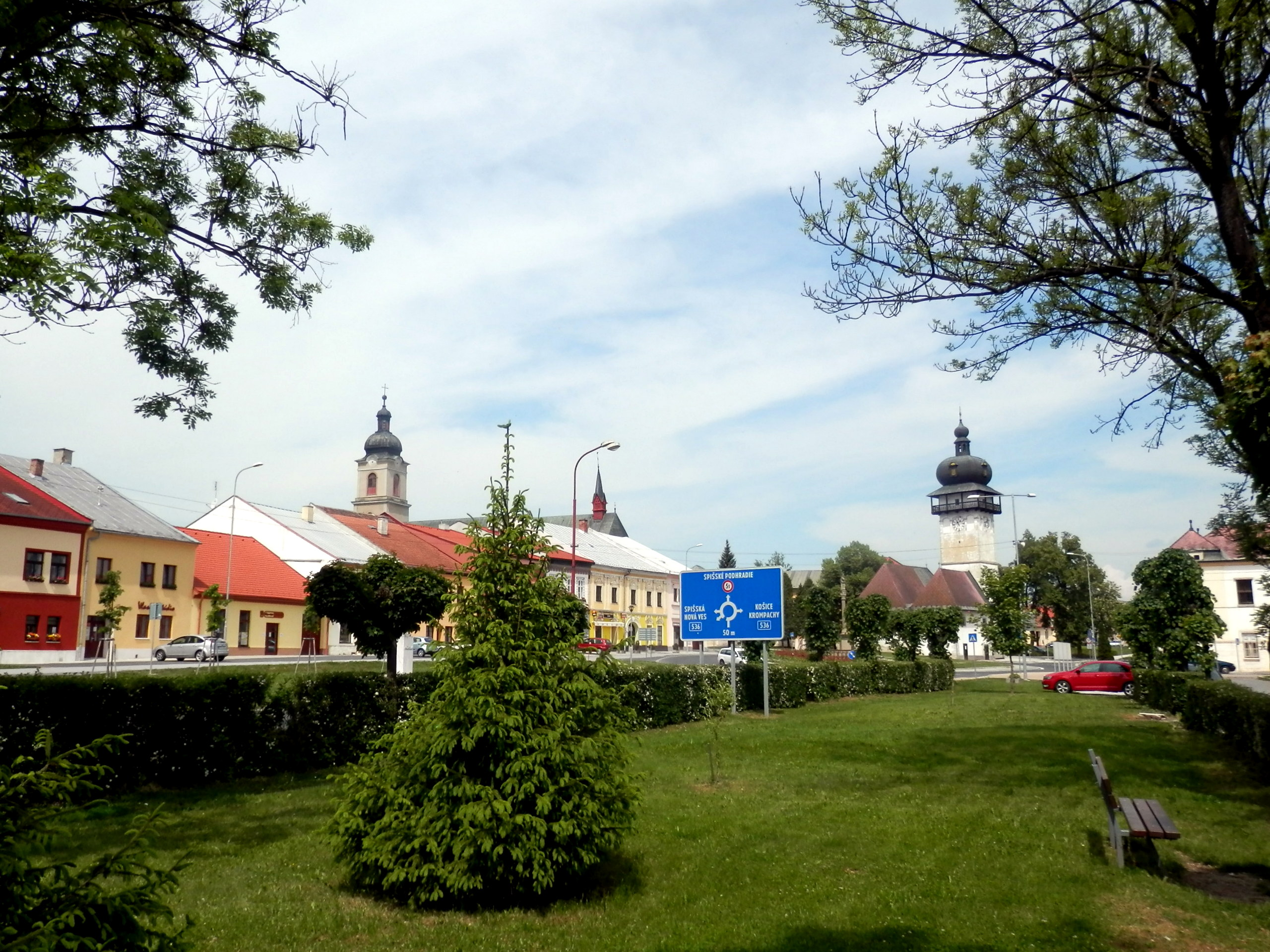 Mesto Spišské Vlachy. Okres Spišská Nová Ves.